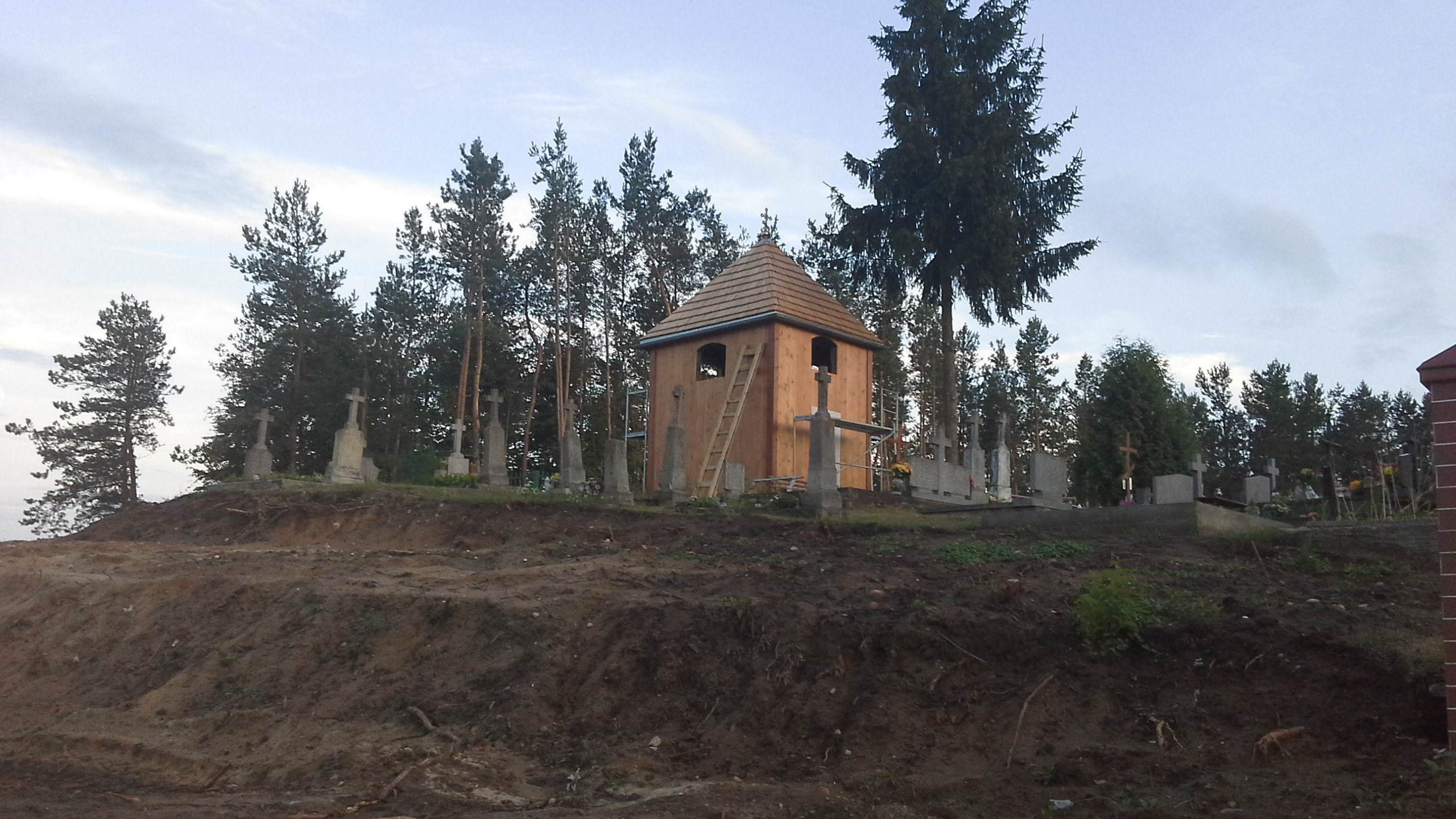 Cmentarz prawosławny w Rogawce - budowa nowej dzwonnicy cerkiewnej